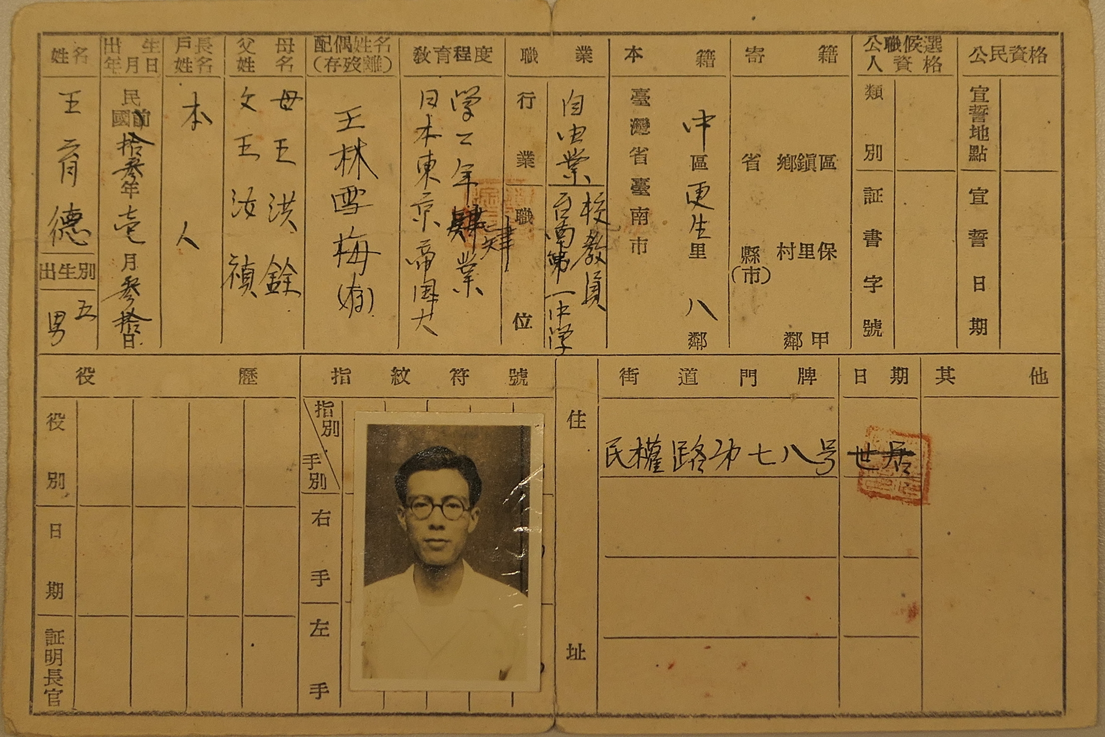 中文（台灣）: 王育德的中華民國國民身分證（1947年6月）。拍攝於王育德紀念館，為該館展示品。